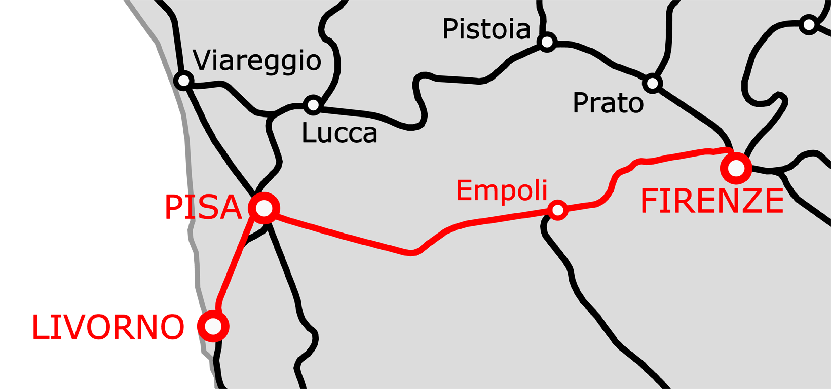 Tracciato della Ferrovia Leopolda